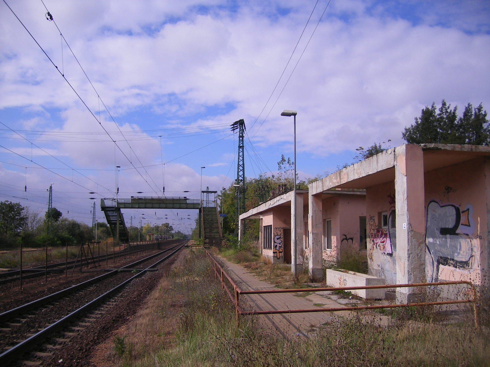 Almásfüzitő-felső vasútállomás